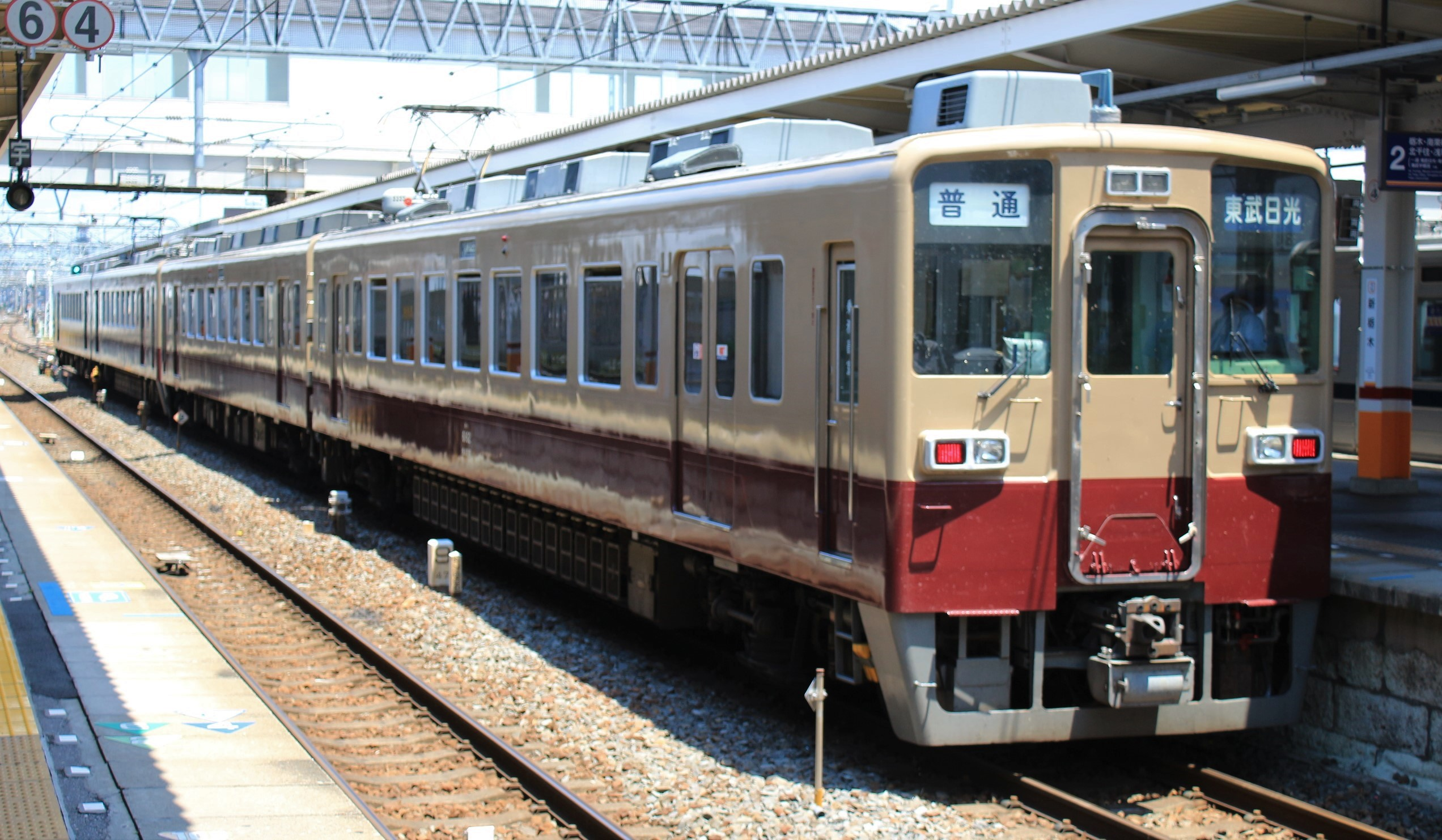 東武日光線開業90周年を記念して2019年11月より運転を開始した、6000系ツートンカラーの6050系電車